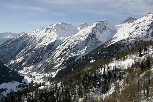 Blick von der Lauchernalp nach Goppenstein (Lötschental)